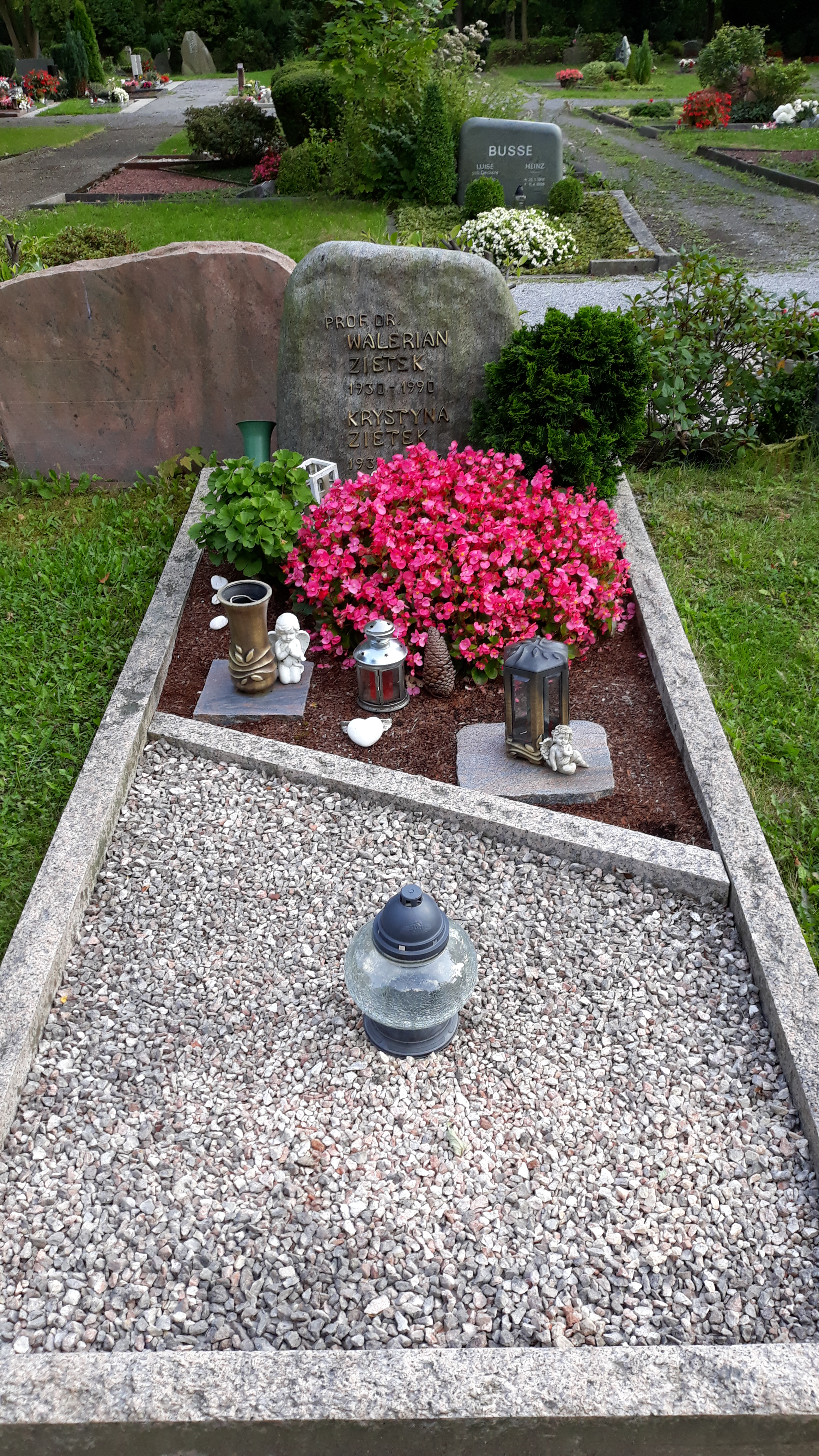 Das Grab des polnischen Physikers Walerian Zietek und seiner Ehefrau Krystyna auf dem Hauptfriedhof Iserlohn.